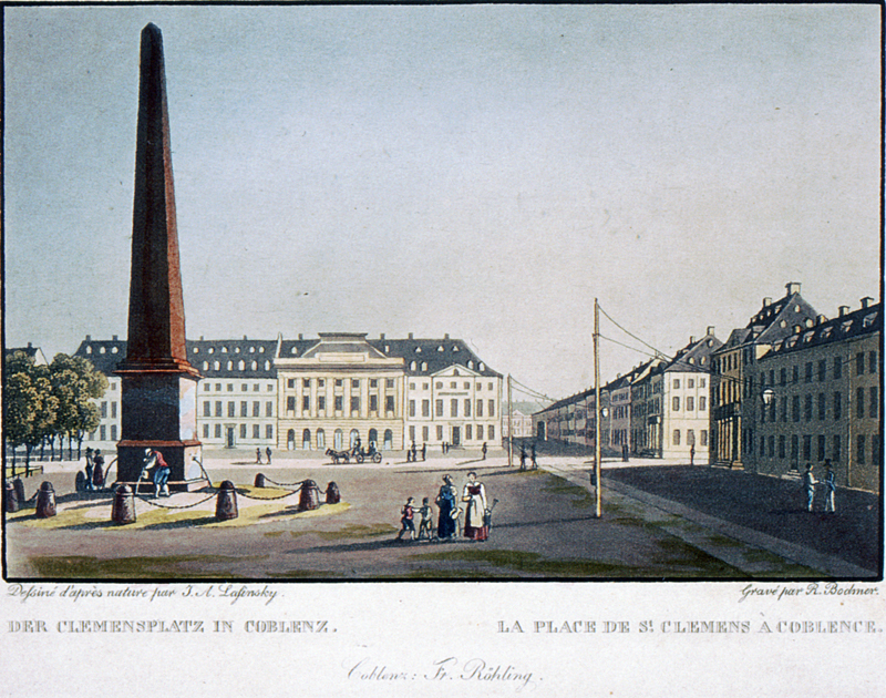 Obelisk am Clemensplatz